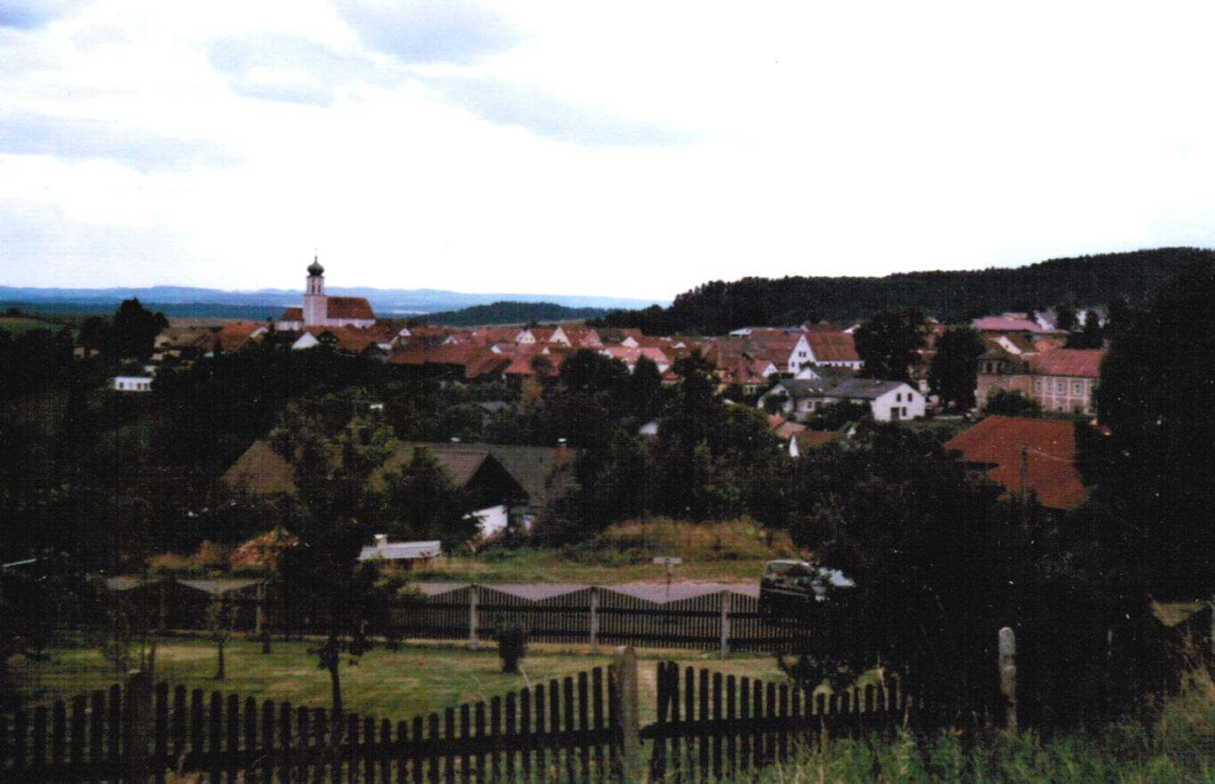 Stamsried Ansicht des Ortes